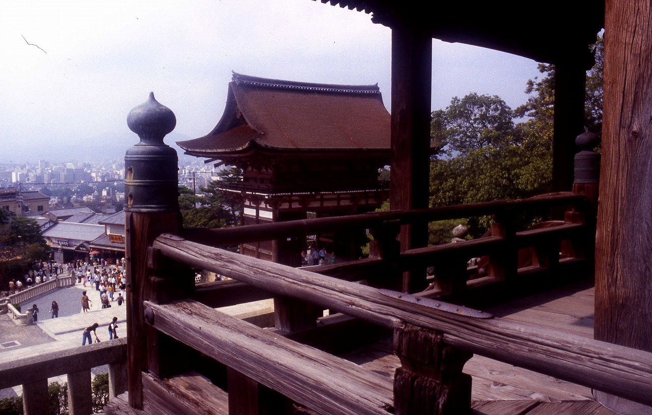 清水の舞台から「飛び降り」る（清水寺）